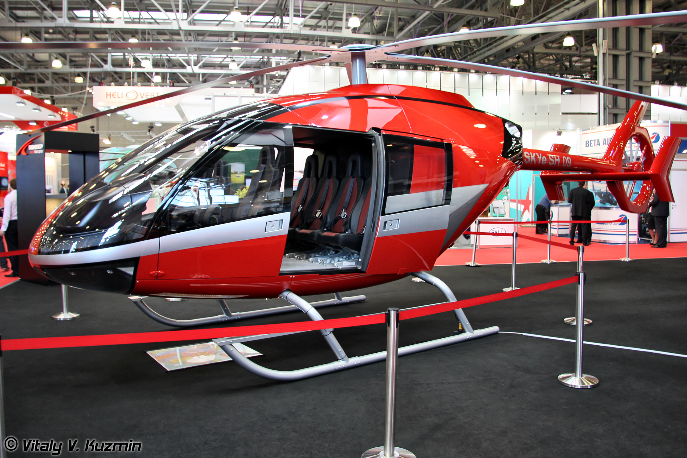 Прототип Marenco SKYe SH09 (Marenco SKYe SH09 prototype)